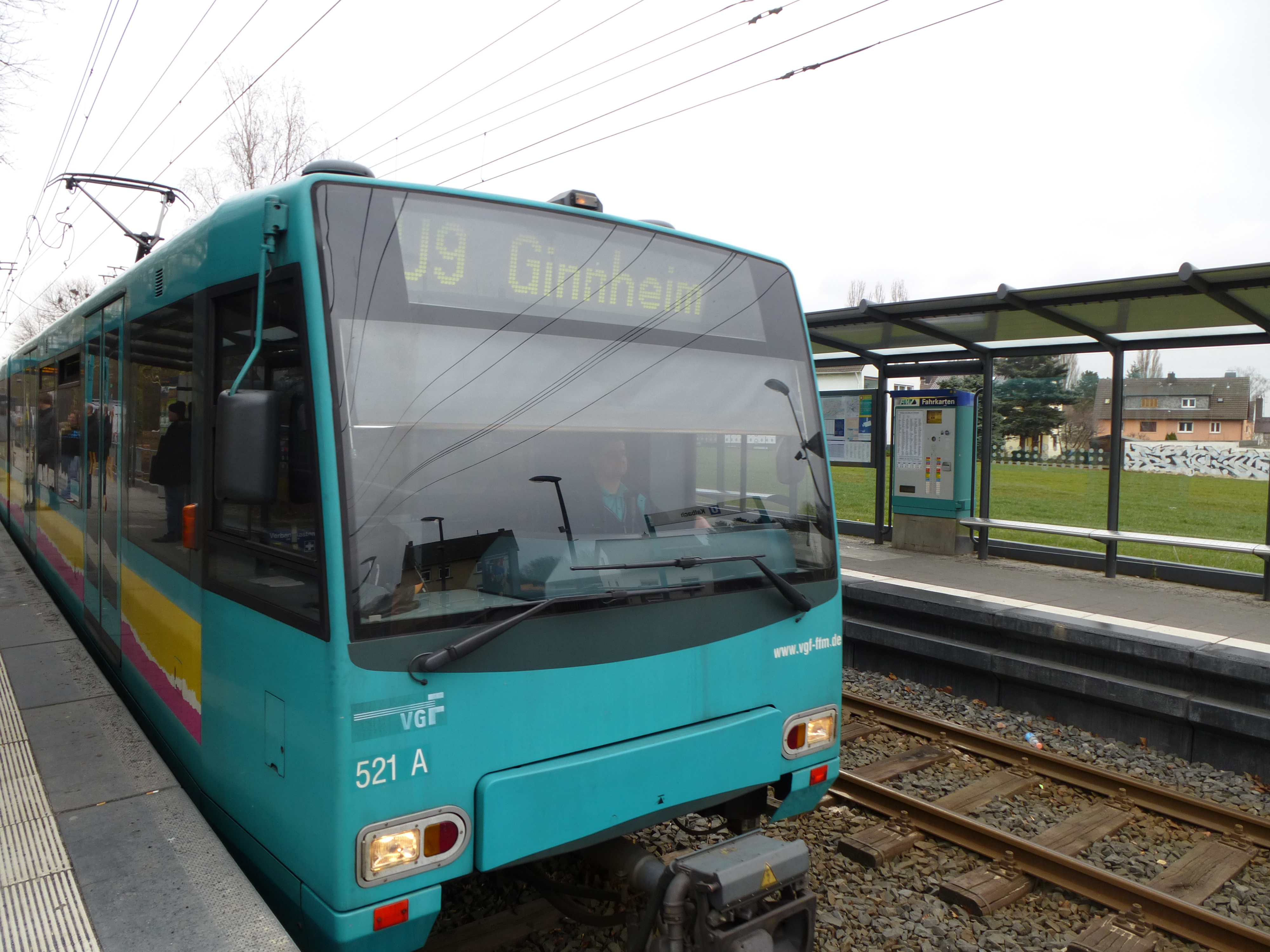 Hier U4-Triebwagen 521 in Kalbach